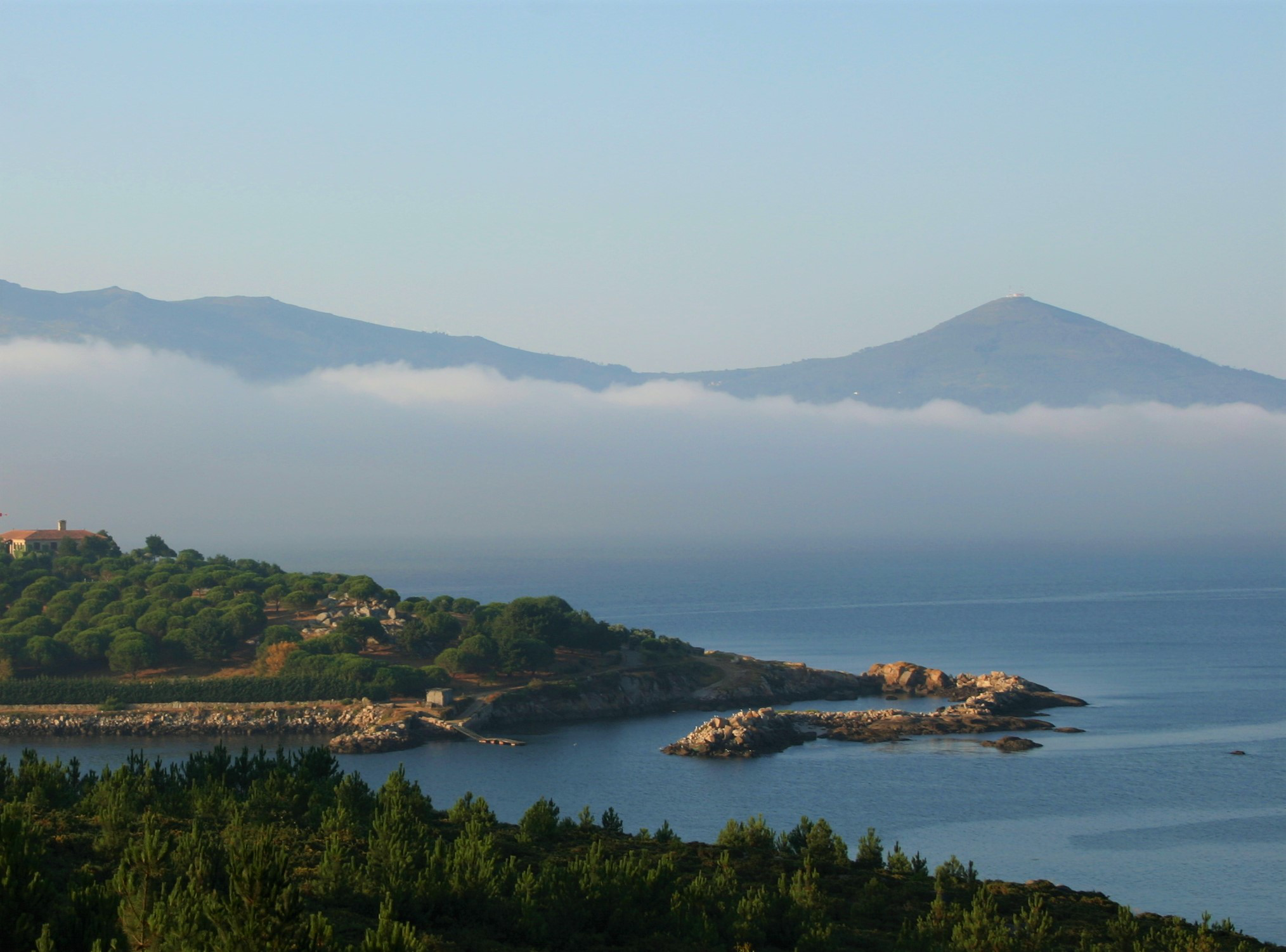 Monte Enxa dende Muros